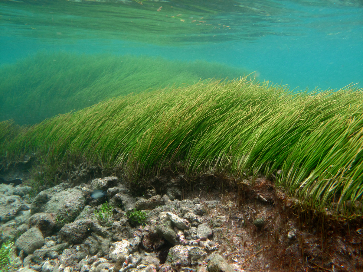 L'herbe marine Syringodium isoetifolium ployant sous la houle à la Réunion.